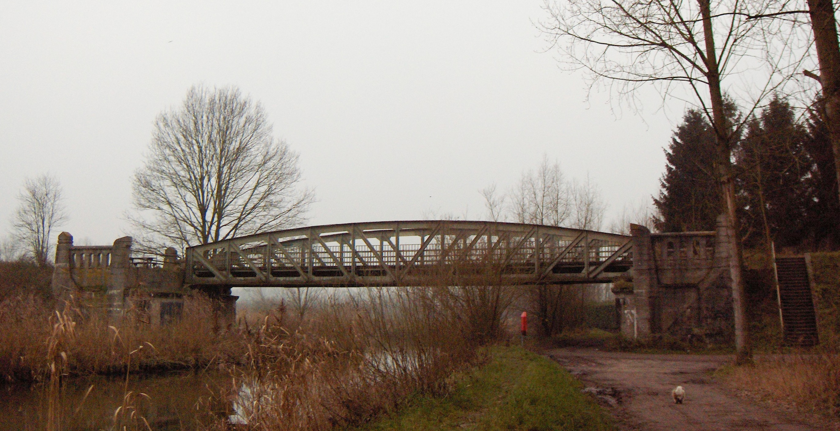 Spletterenbrug in de buurt van Eksaarde, brug op de nu opgebroken spoorlijn 77A van Lokeren naar Moerbeke-Waas